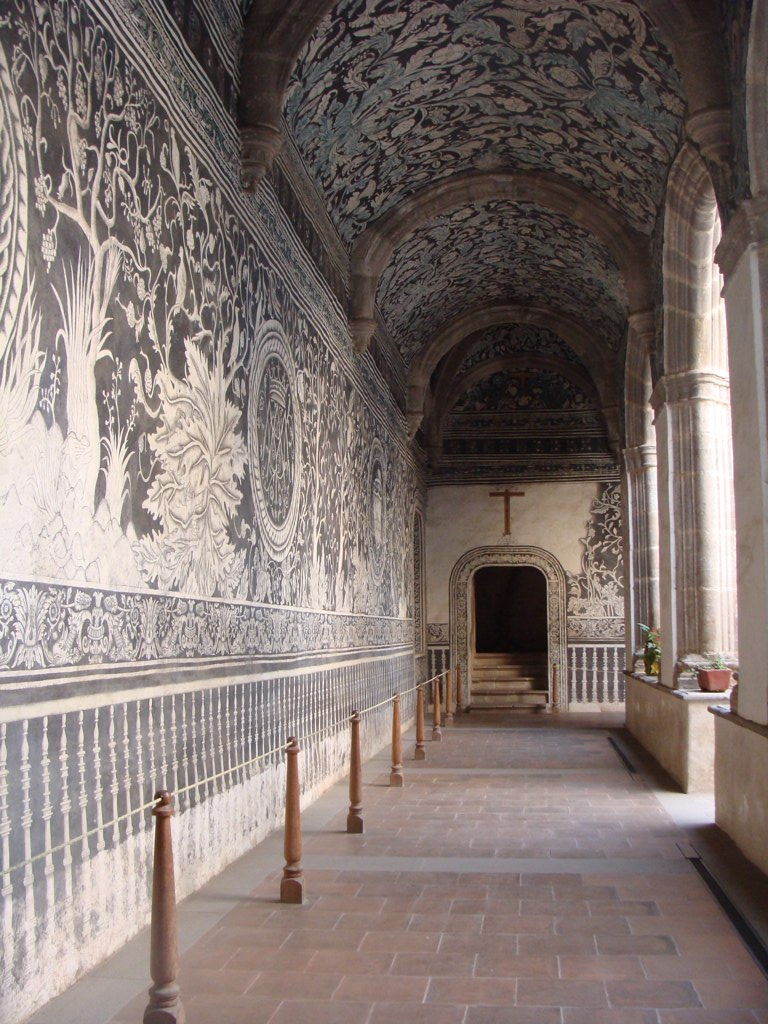 Malinalco, MX